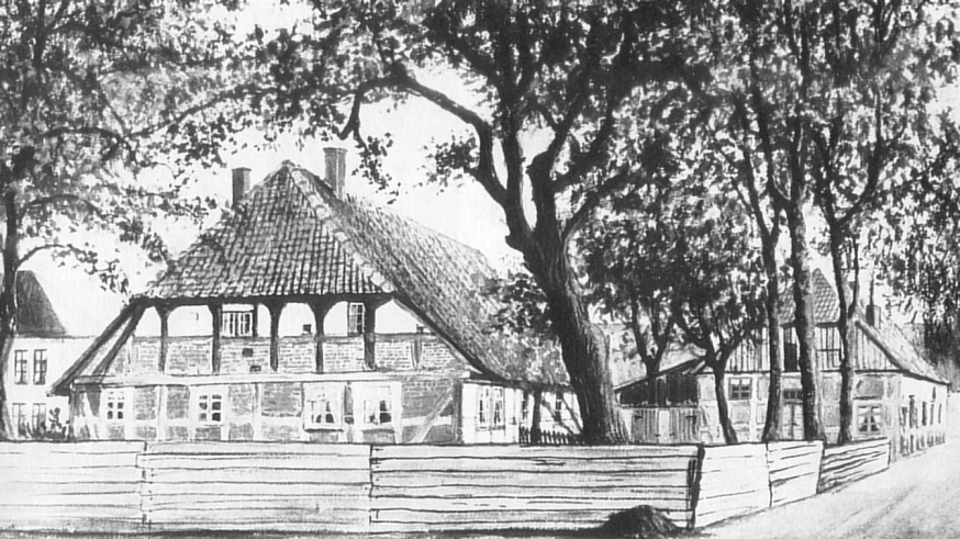 Köritzhof, Aquarell